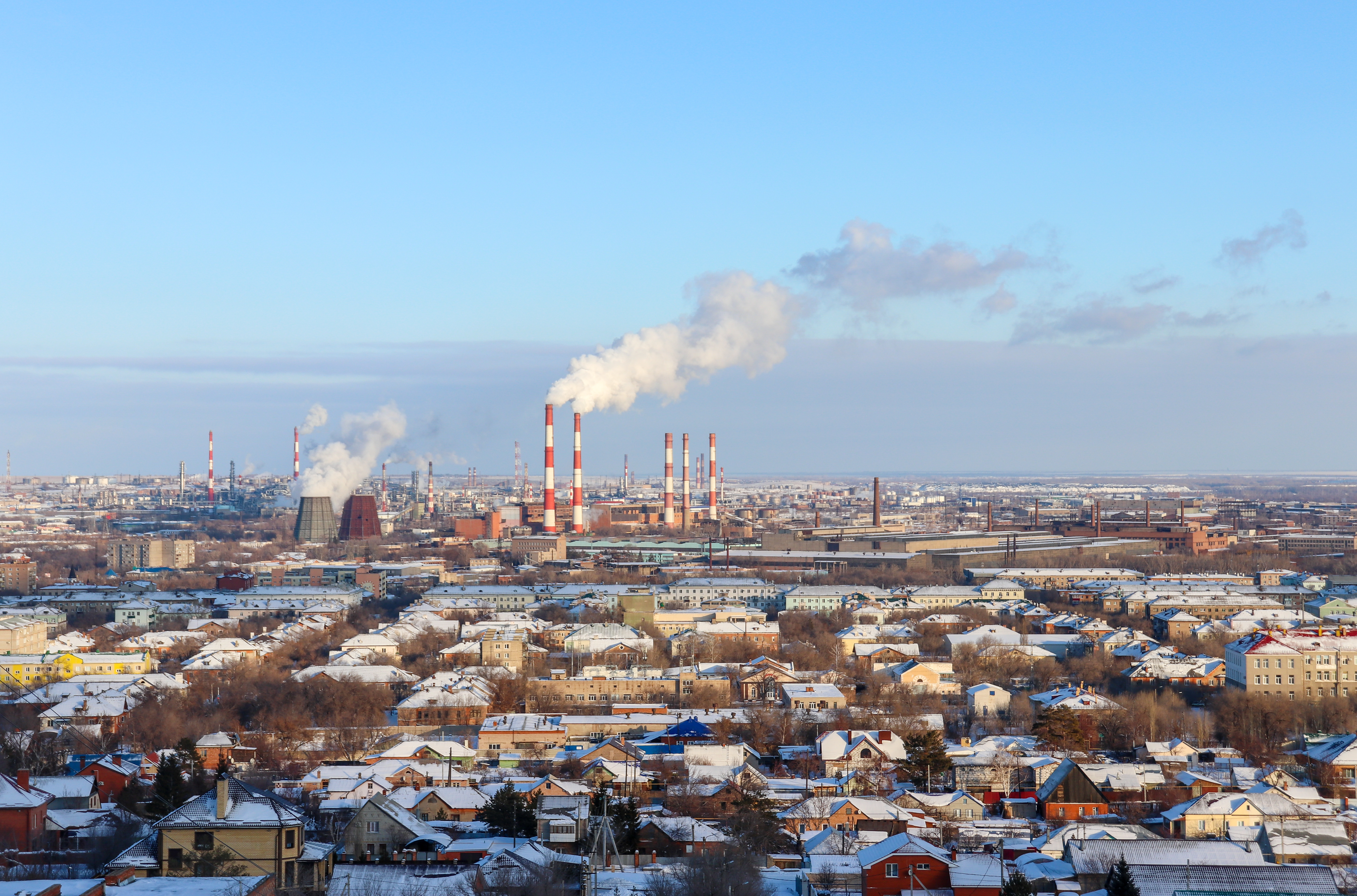 Вид на Орск со смотровой площадки